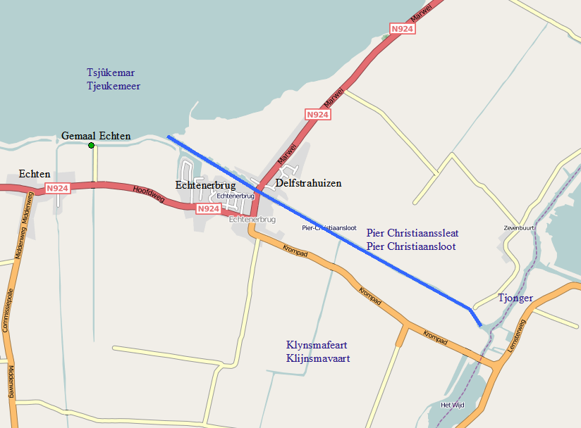 Pier Christiaanssleat